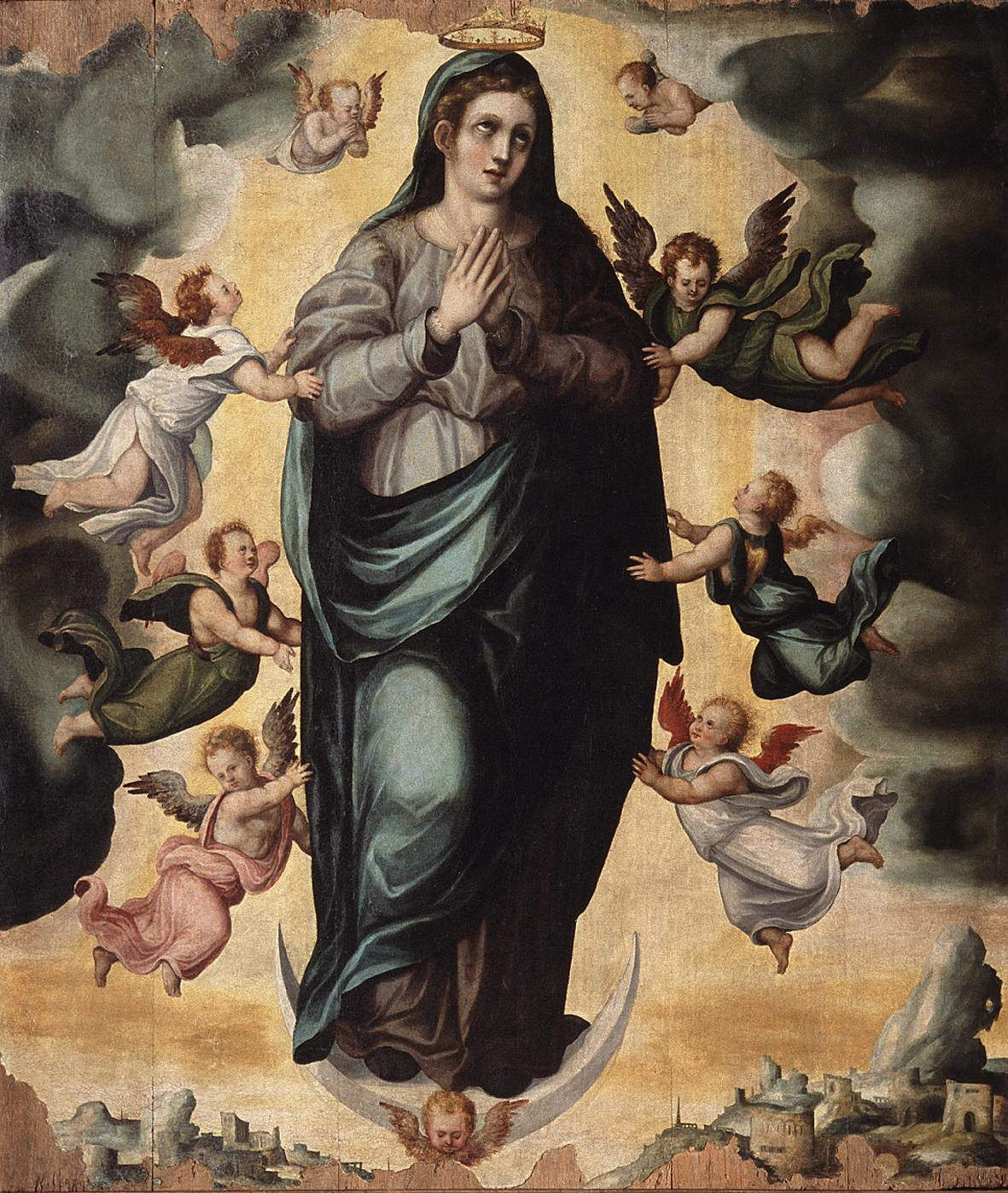 La obra representa a la Virgen María como reina o señora de los Ángeles.